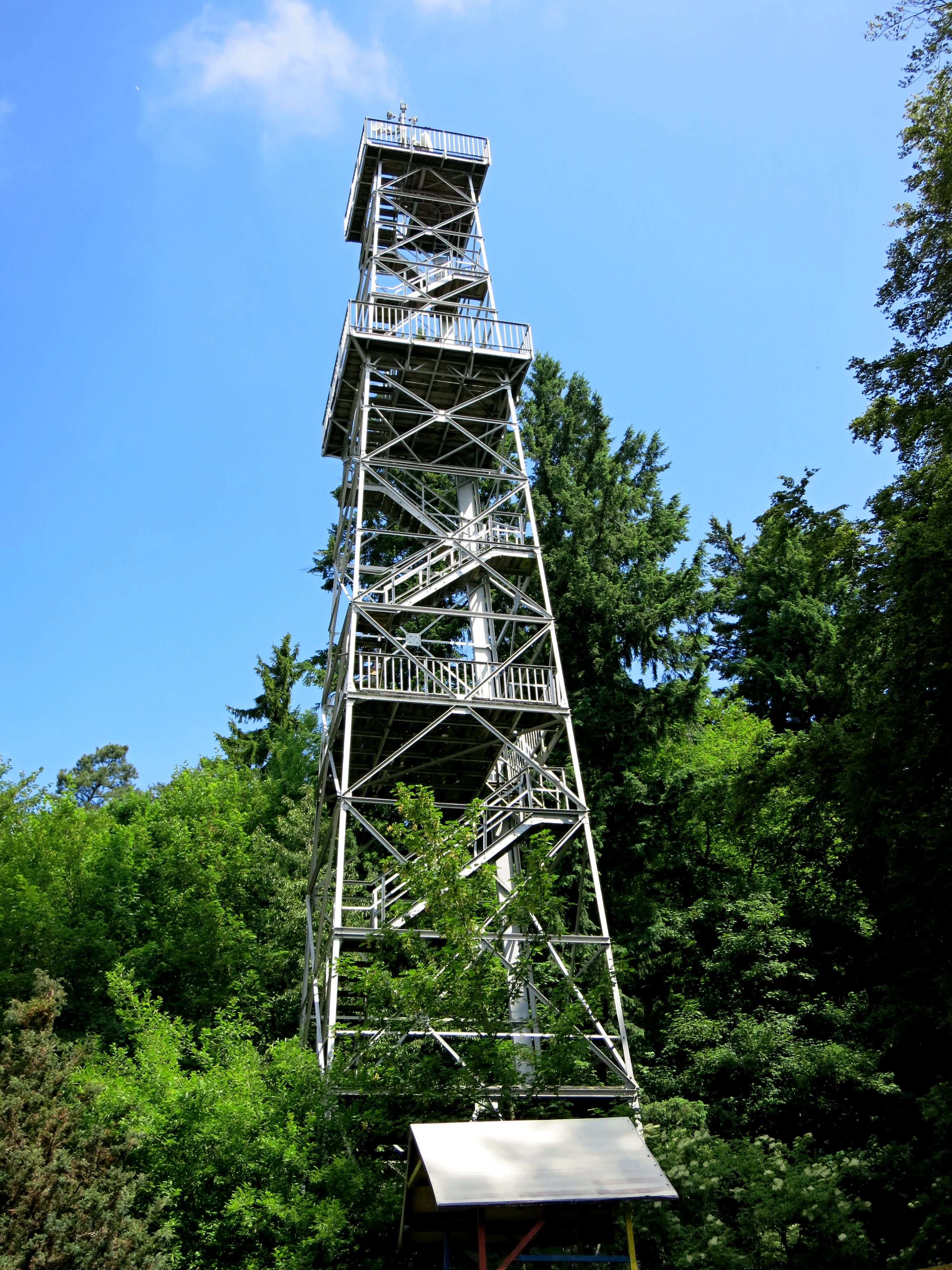 Maiengrünturm